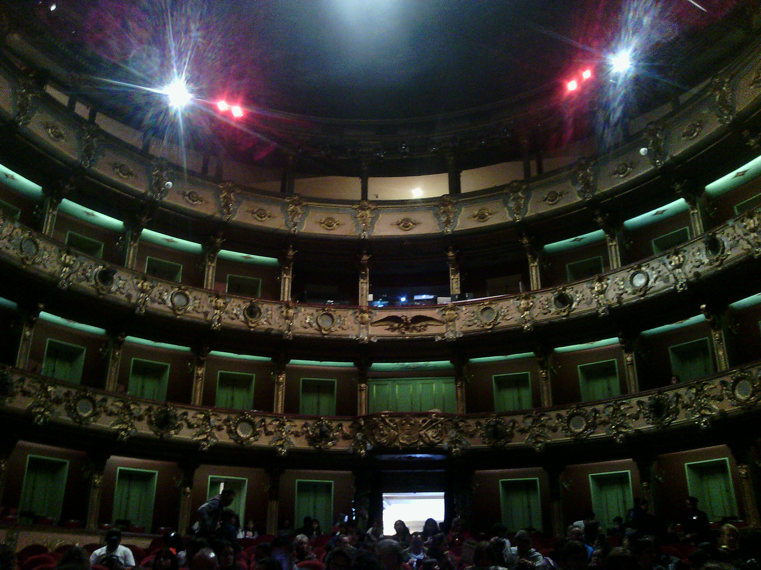 Palcos de asientos en el teatro Colón de Bogotá (Colombia)